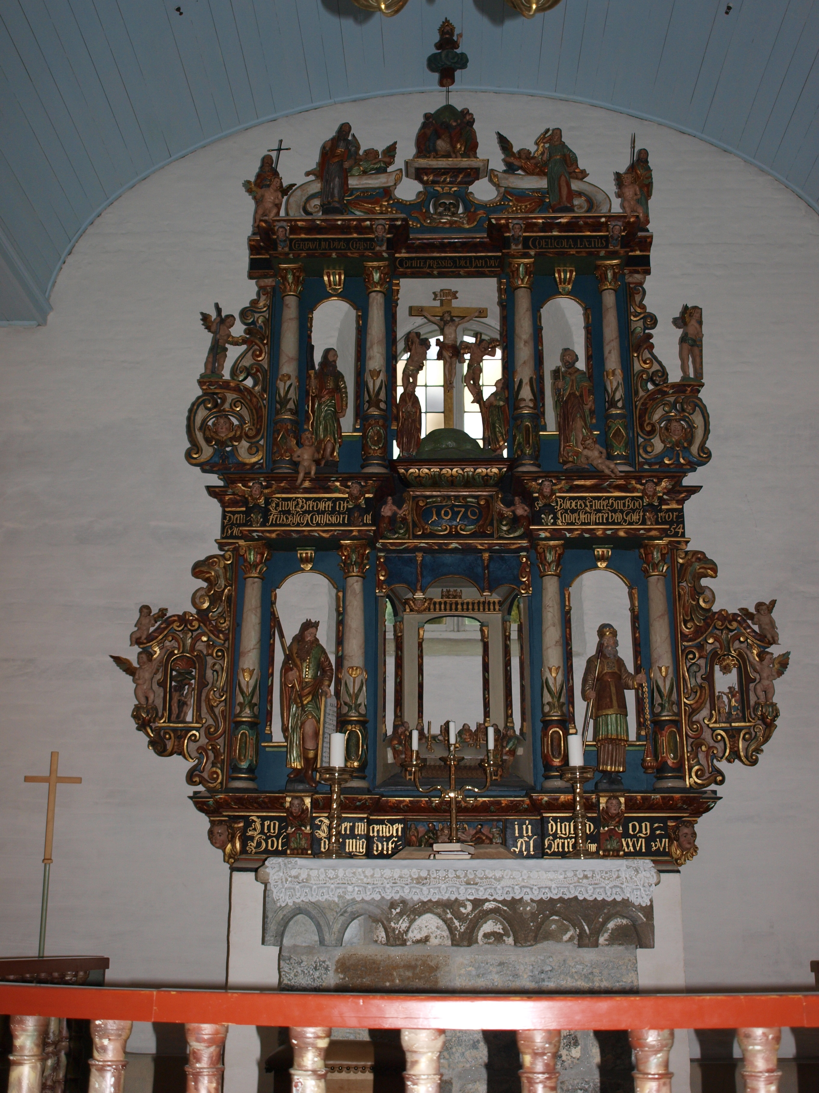 Bodin kyrkje